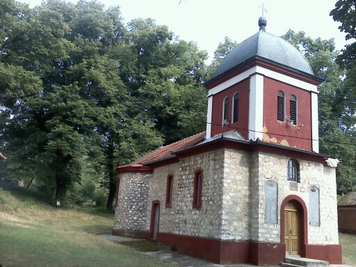 Crkva Svete Ane u Žirovnici